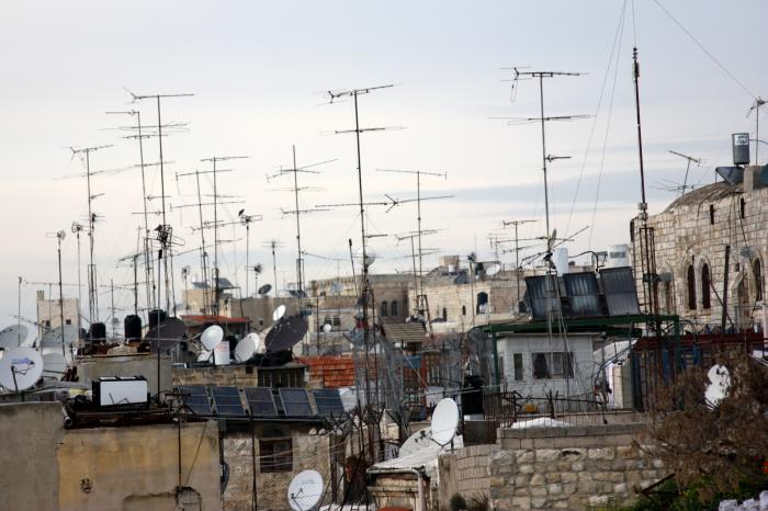 מראה גגות העיר העתיקה